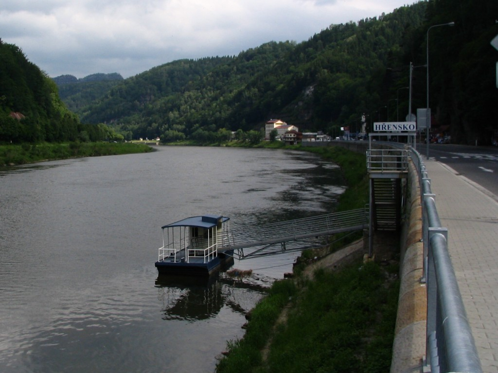 Pohled na Labe v Hřensku.